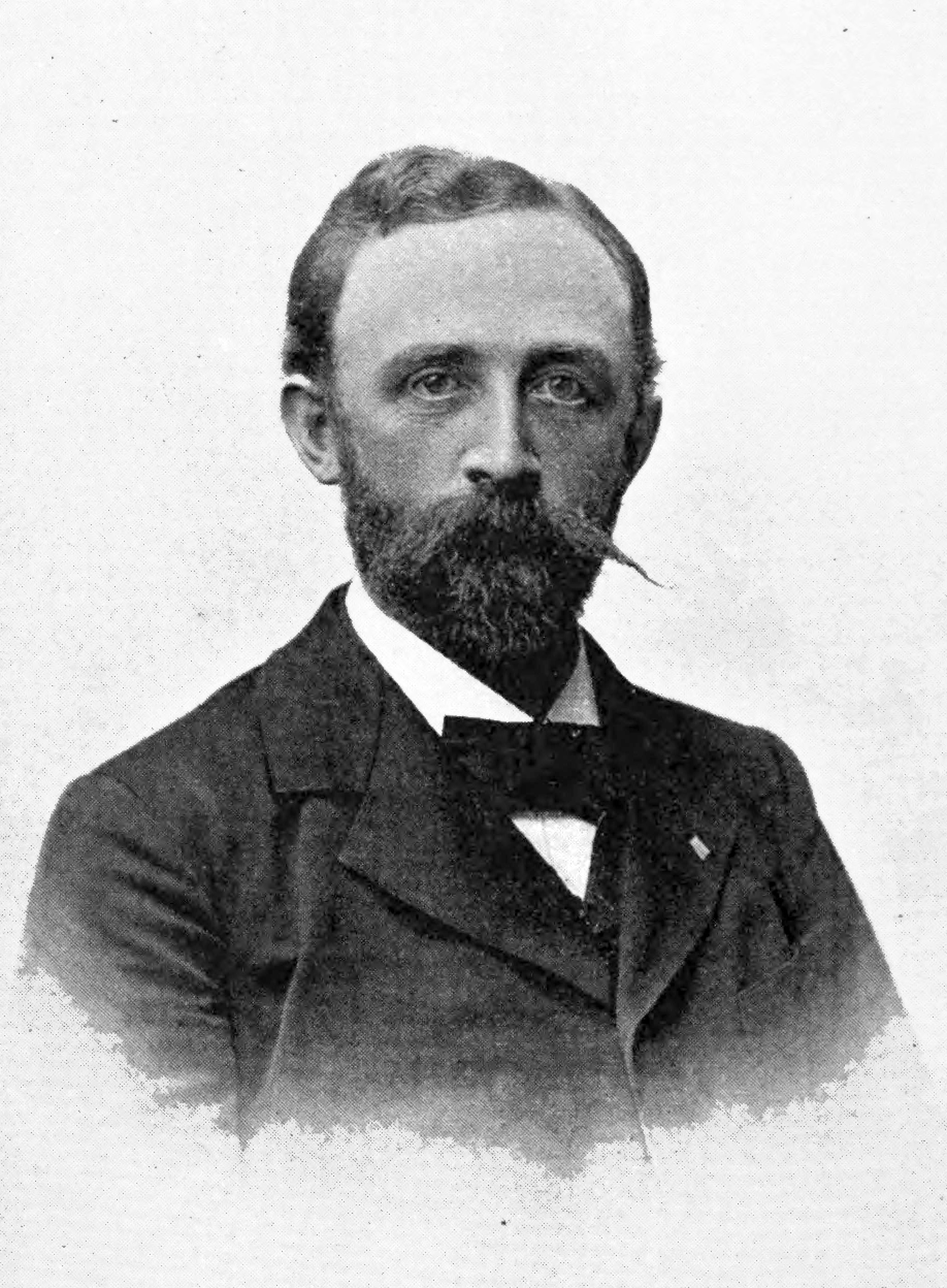 Henrik Berg (1858-1936)